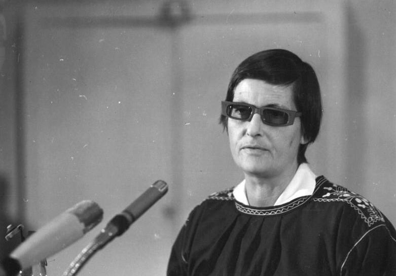 Zentralbild Franke 14.11.1966 Die 1. Jahreskonferenz des Deutschen Schriftstellerverbandes fand in der Zeit vom 2.11. - 4.11.66 in der Kongreßhalle am Berliner Alexanderplatz statt. 350 Teilnehmer der Konferenz (Schriftsteller, junge Autoren, schreibende Arbeiter, Literaturwissenschaftler und Bibliothekare) berieten über die Entwicklung der sozialistischen deutschen Nationalliteratur. UBz: Dr. Christa Johannsen während ihres Diskussionsbeitrages.